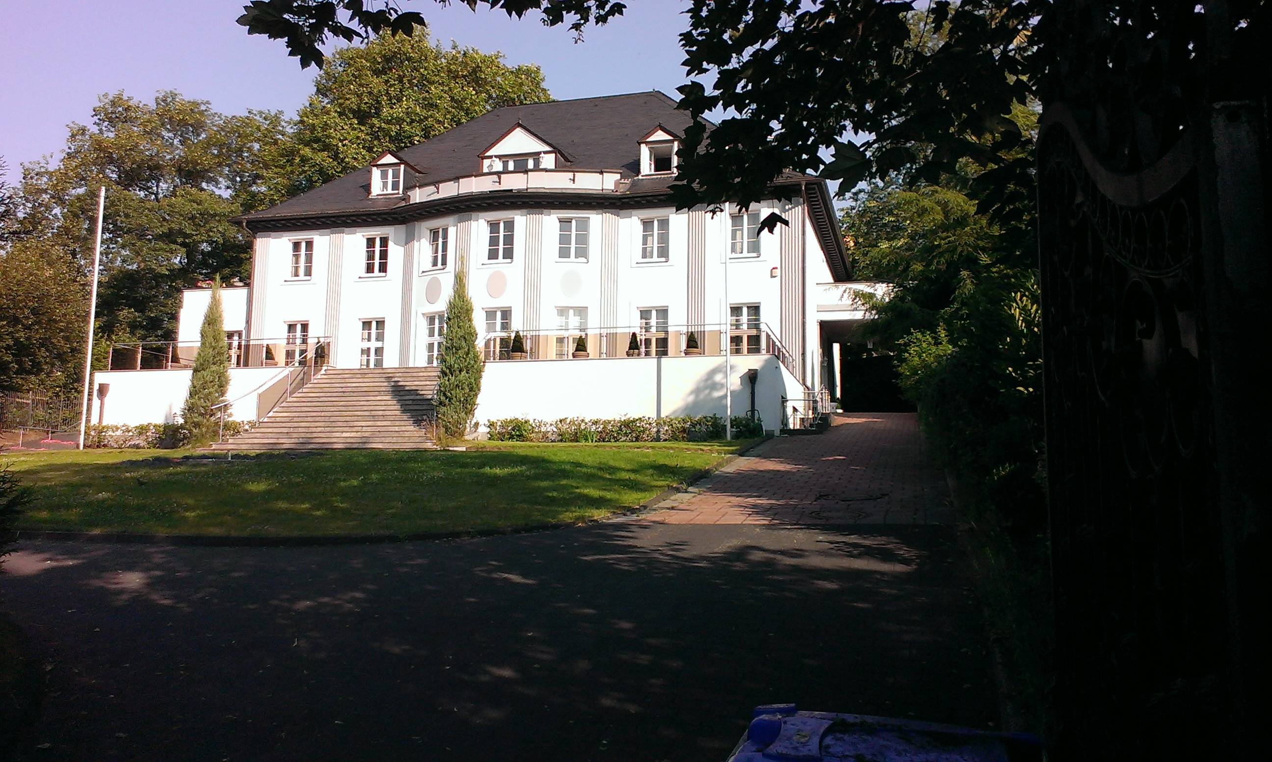 Wetter (Ruhr), Kaiserstr. 151, „Villa Pegau“ This is a photograph of an architectural monument.